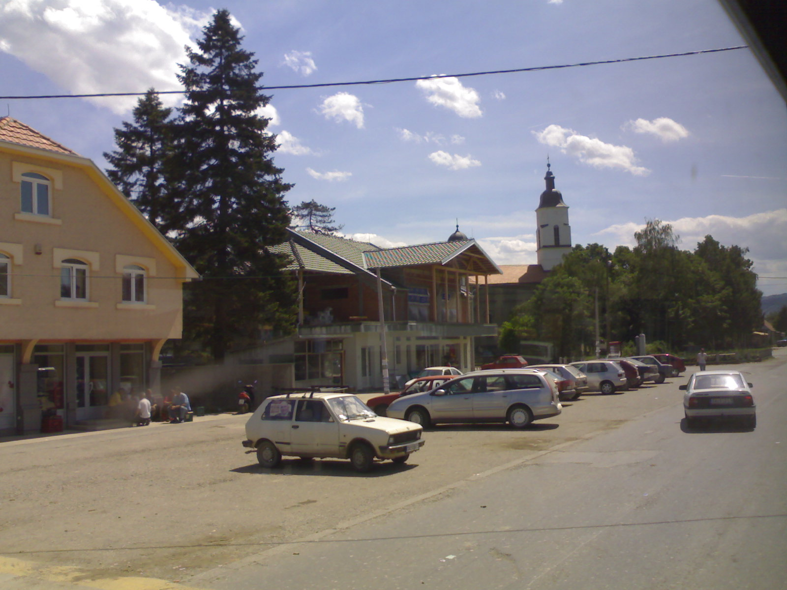 Село Липолист-Шабац, сликано 6. 5. 2012. Licensing